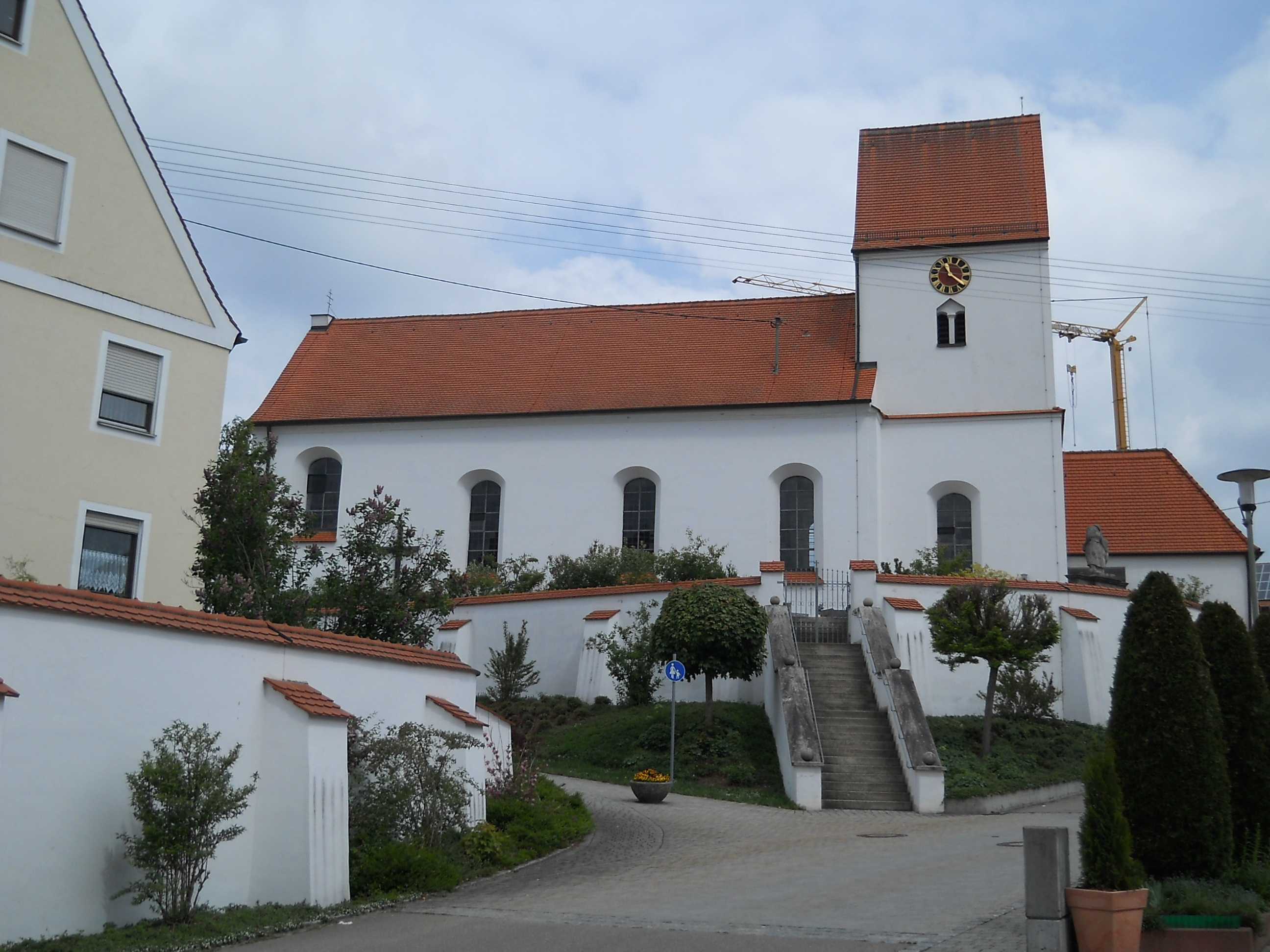 Daiting, Landkreis Donau-Ries, Bistum Augsburg, Pfarrkirche St. Martin, Südseite